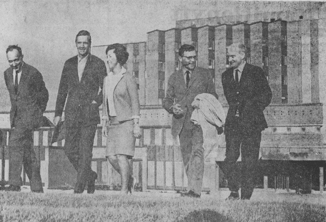 Löwenströmskas nybyggnad. Fru Dagmar Jansson, direktionens ordförande, med t.v. sjukhusets arkitekter Kai Vang och Anders Tengbom samt t.h. inredningsarkitekterna Sven Kai-Larsen och Tore Darelius